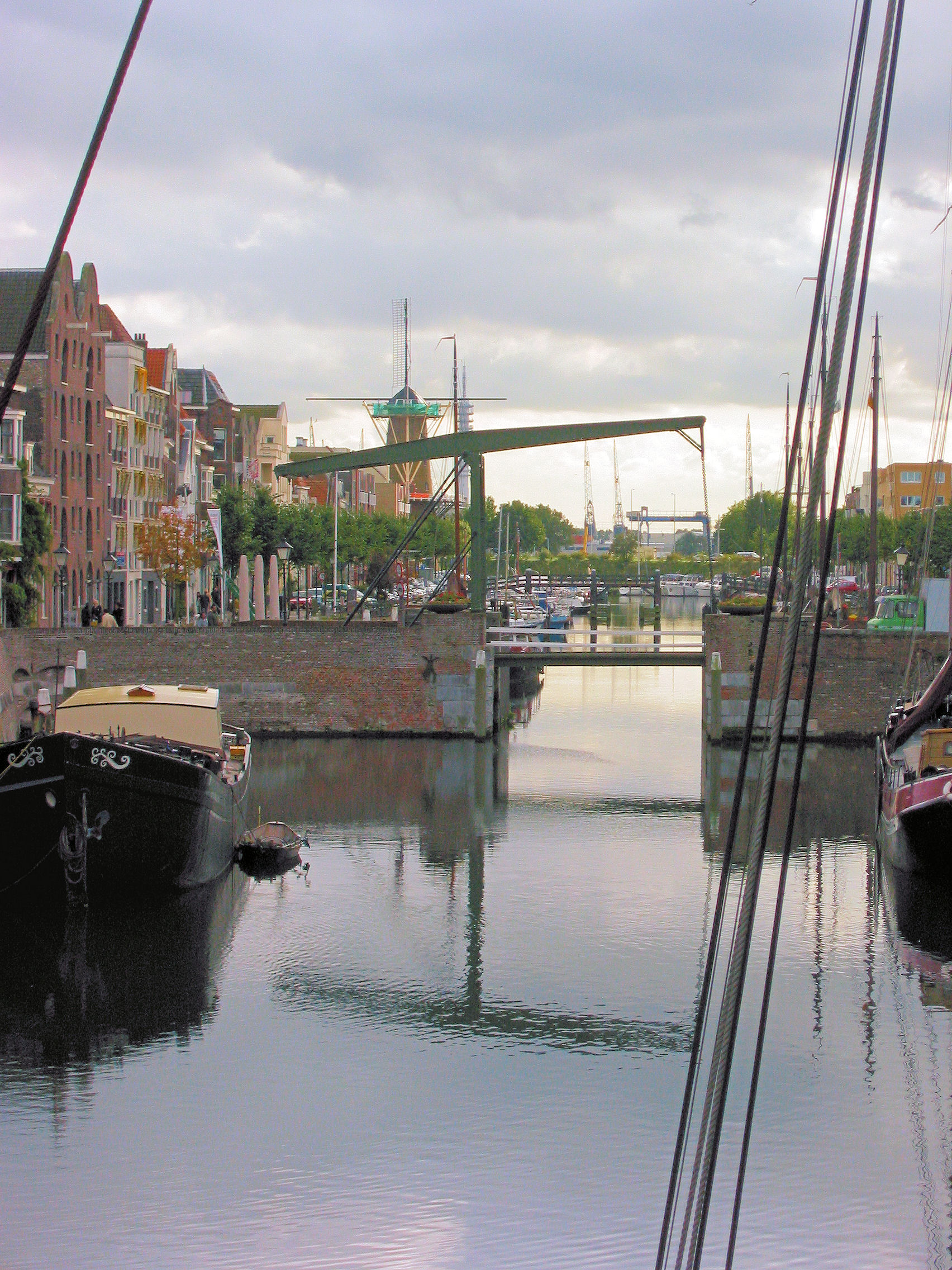 Delfshaven, Zuid-Holland, the Netherlands